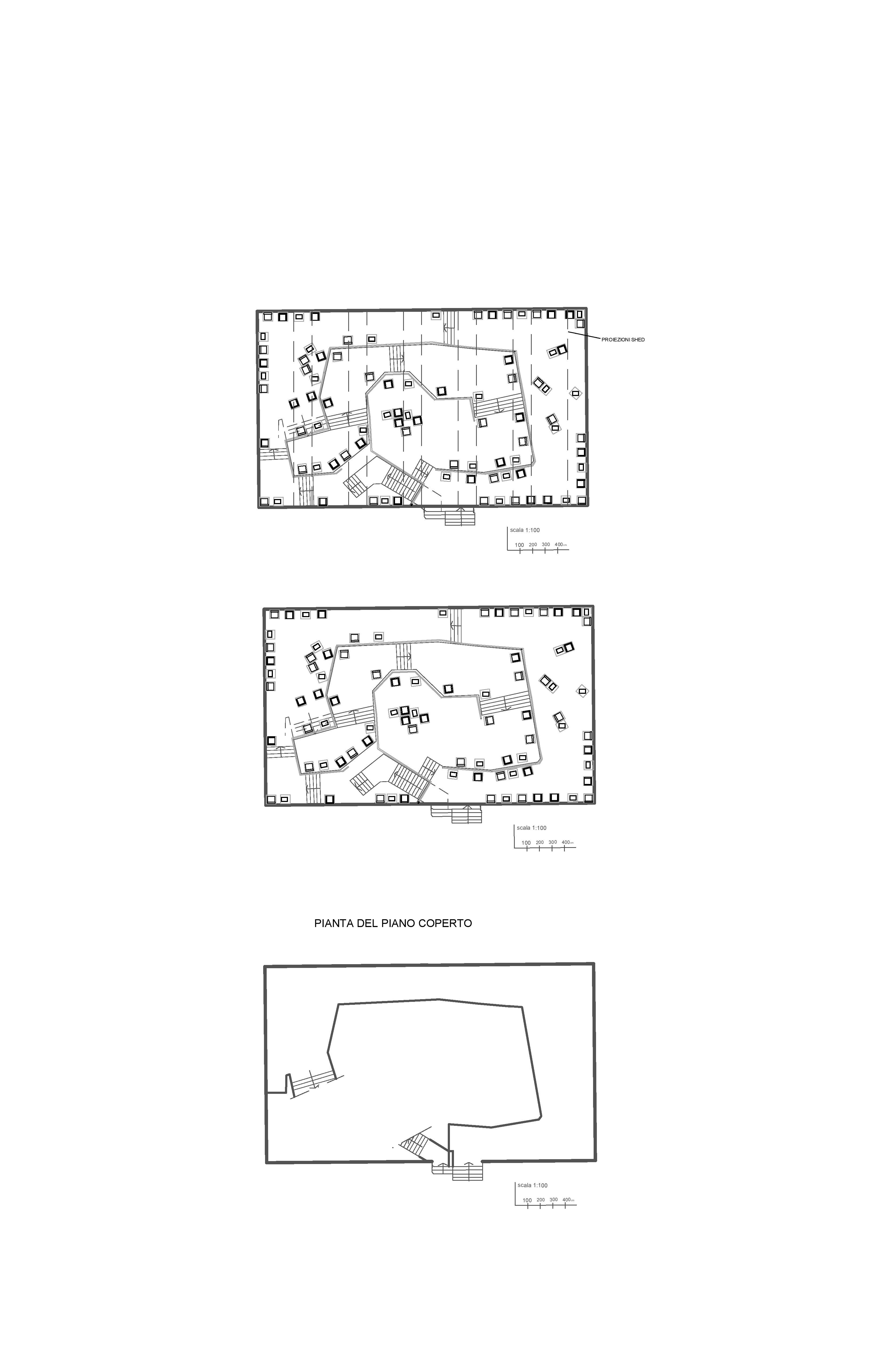 Template:Screenshotcopyrighted